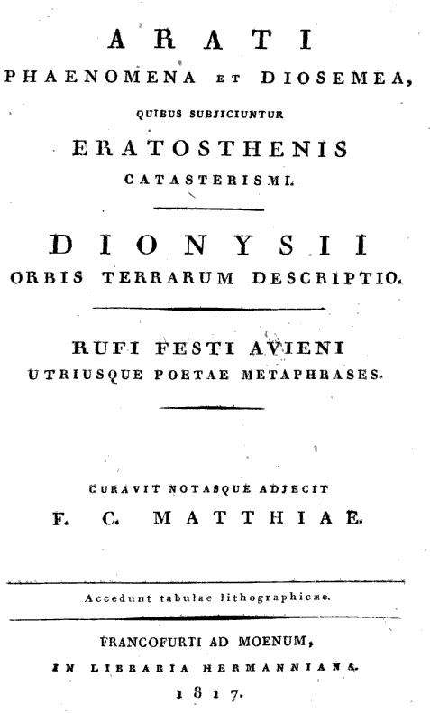 Friedrich Christian Matthiä, Buchscan Titelseite 1817